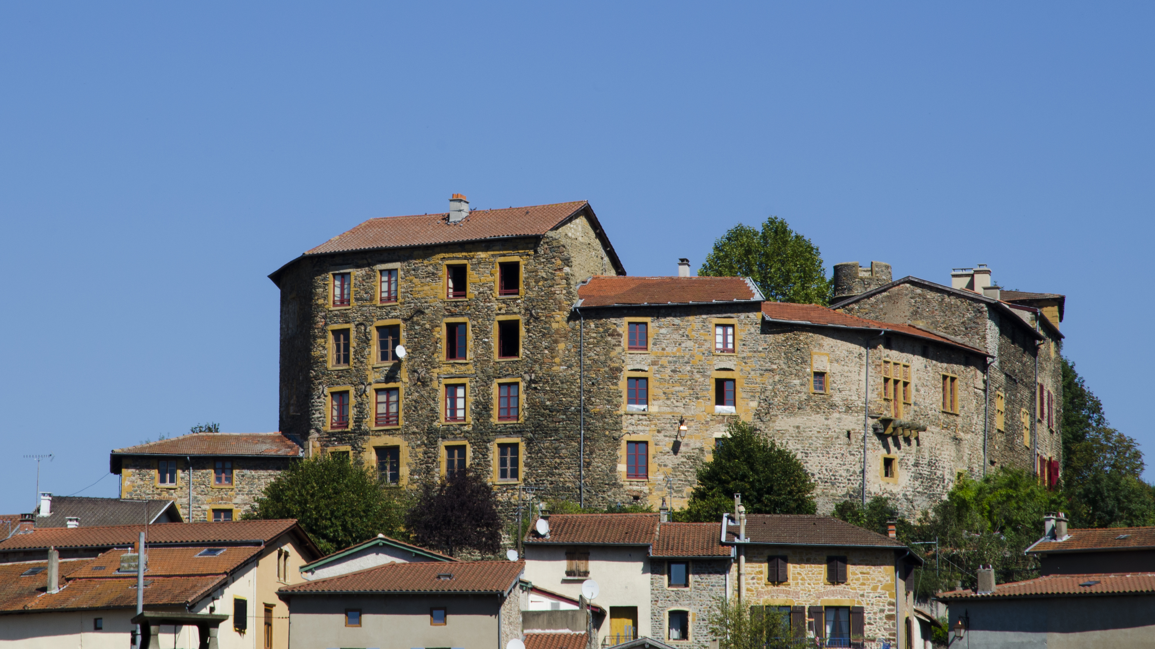 Château de Montbloy à Sain Bel, Rhône .